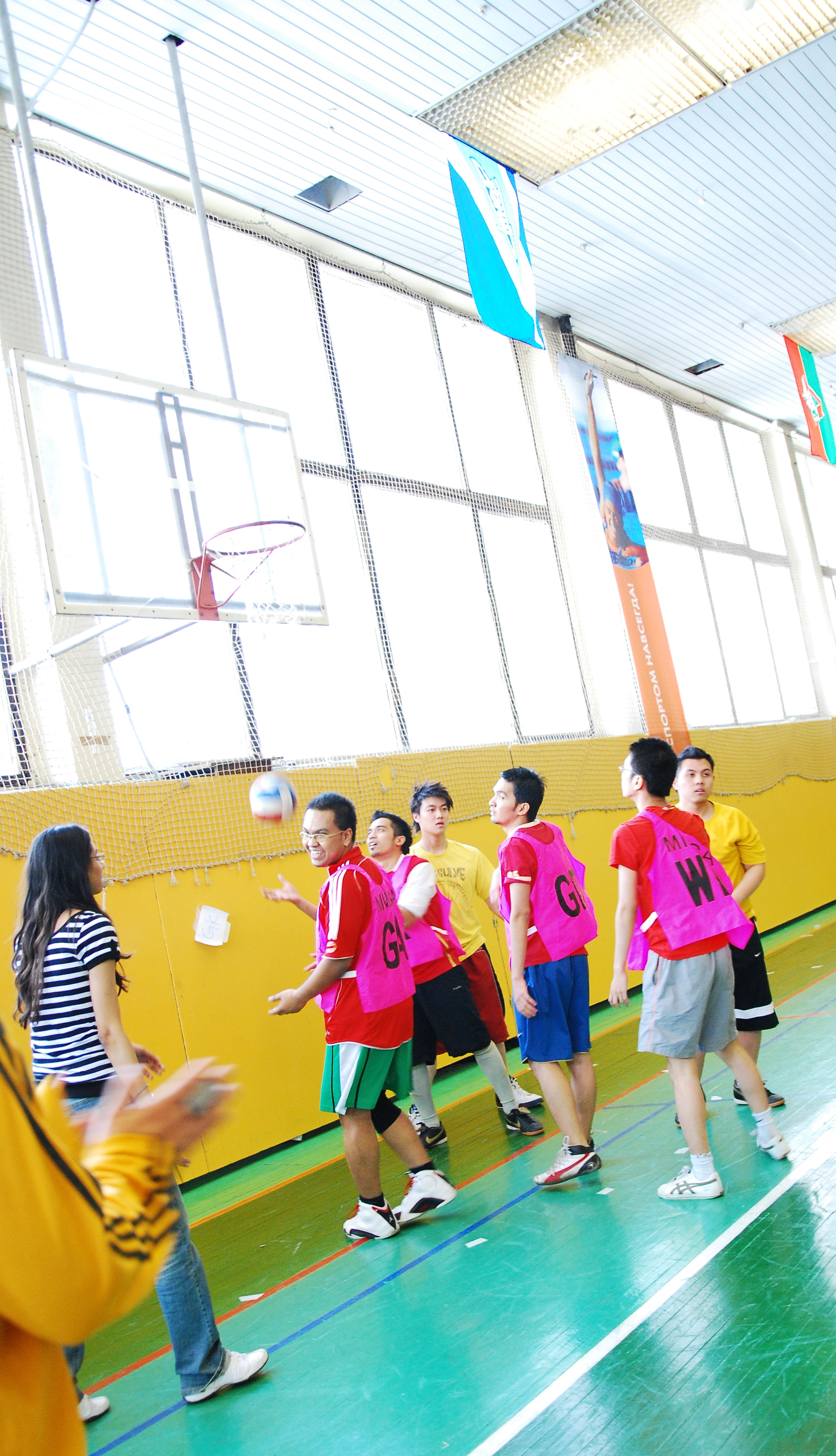 Interbatch Games 2009 RMSA . Malaysia.